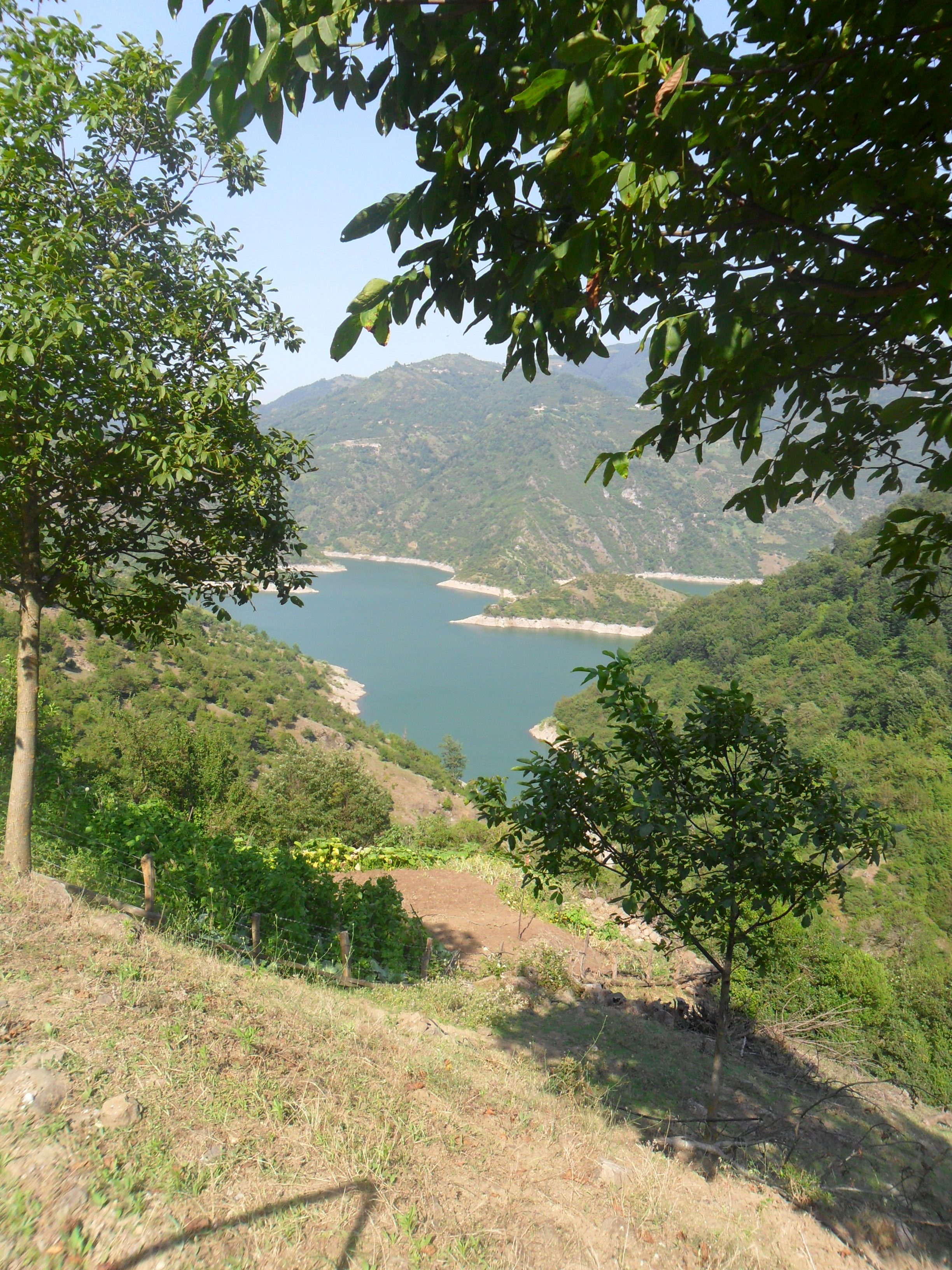 Almus Barajı'nın oluşturduğu göl alanının yukarıdan çekilmiş fotoğrafı.